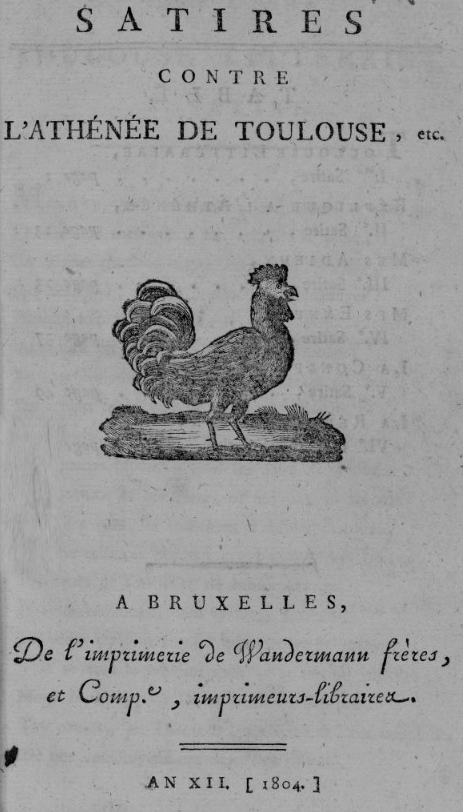 Page de titre de l'ouvrage "Satires contre l'Athénée de Toulouse,etc" publié l'an XII (1804) à Bruxelles.